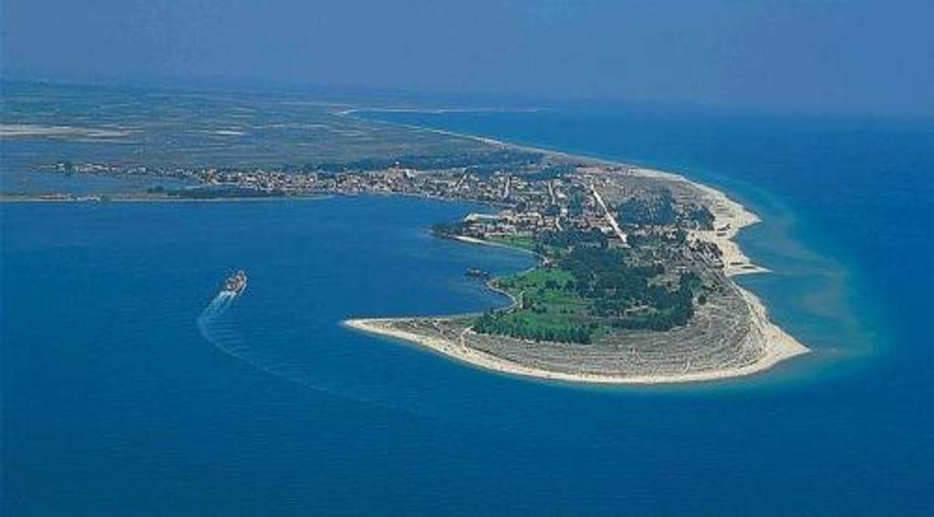 Панорамен изглед към полуострова на Керамоти откъм о-в Тасос